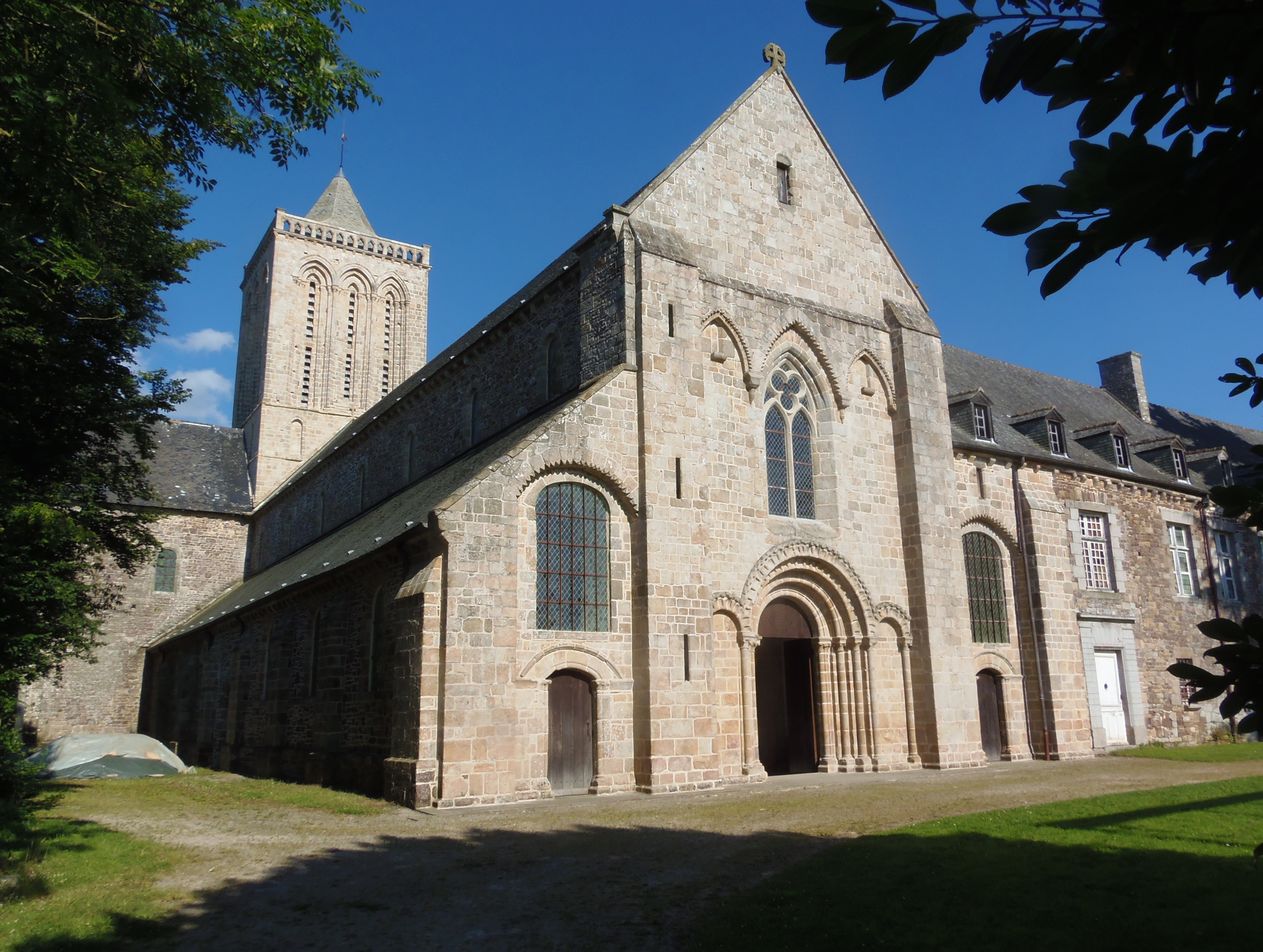 La Lucerne-d'Outremer (Normandie, France). L'abbatiale.